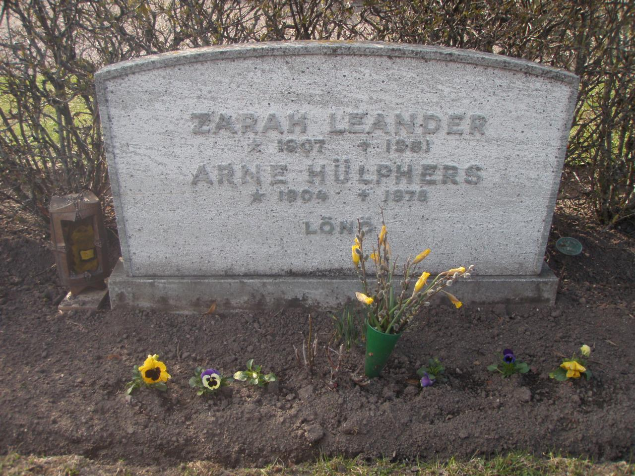 Zarah Leanders och hennes makes grav på kyrkogården vid Häradshammars kyrka.